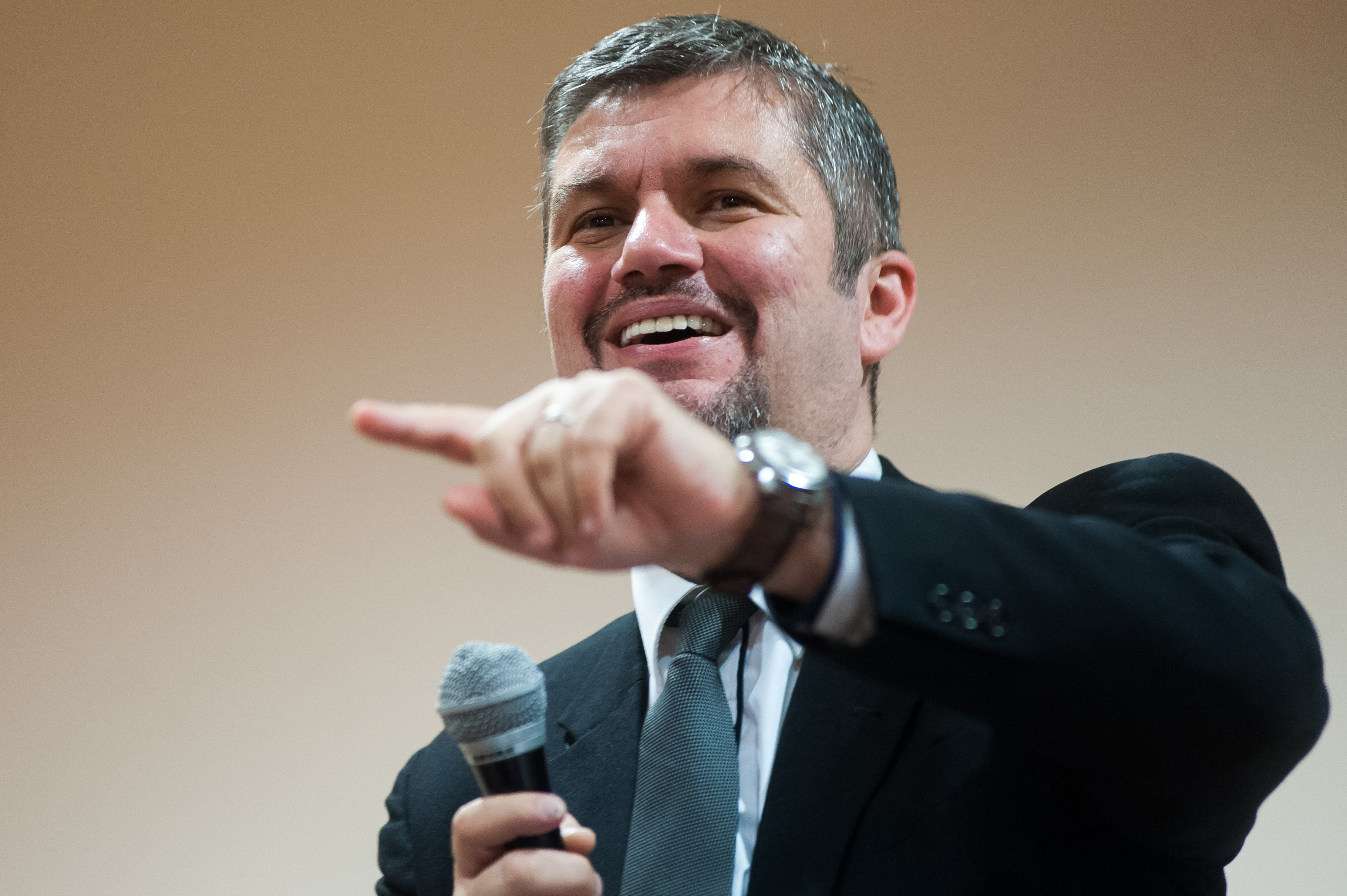 Hadházy Ákos a budapesti Lurdy Konferencia és Rendezvényközpontban.